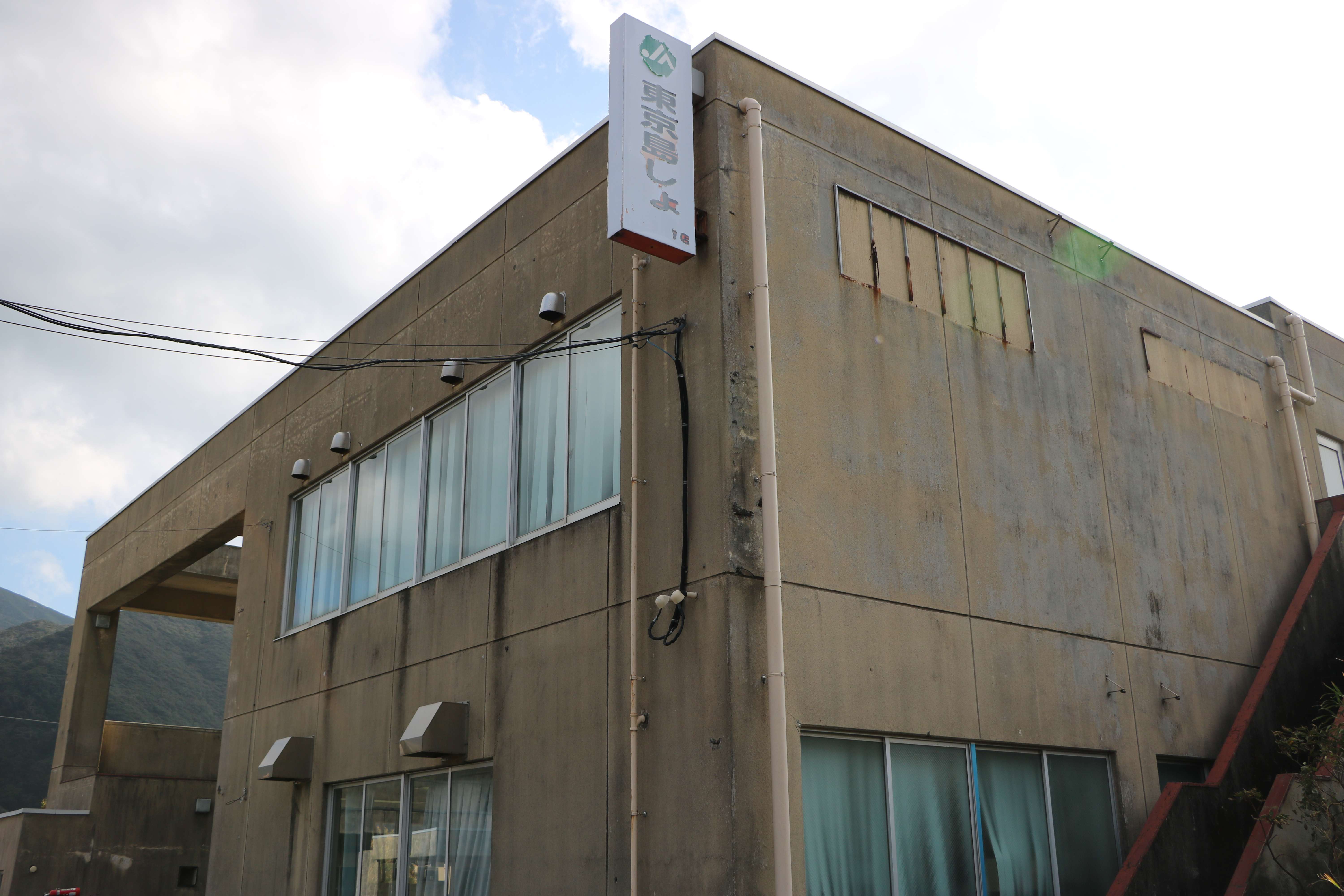 東京島しょ農業協同組合本店（東京都八丈町）